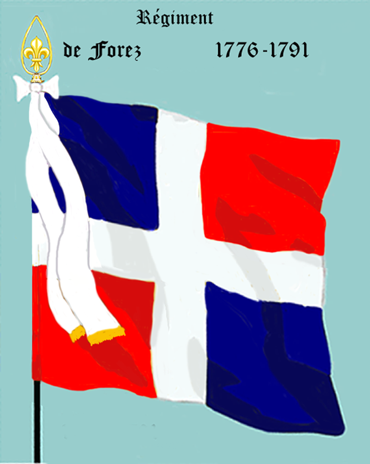 Ordonnanzfahne eines königlich französischen Infanterie-Regiments. - Entnommen und überarbeitet aus: „LES UNIFORMES ET LES DRAPEAUX DE L'ARMÉE DU ROI“ Marseille 1899. (Drapeau d'ordonnance d' un régiment d'infanterie royale française.)